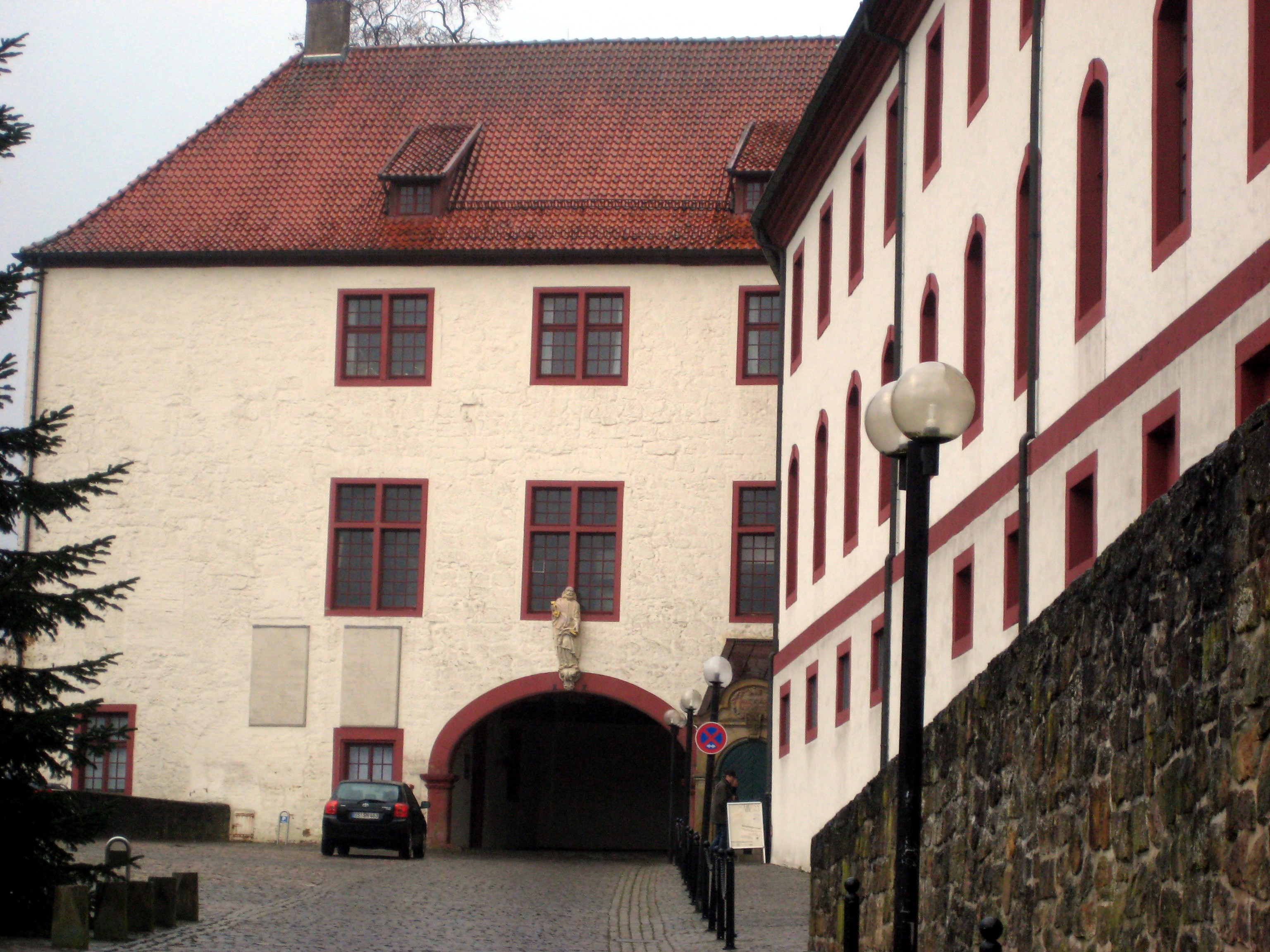 Südflügel des Schlosses Iburg, in dem sich die Evangelisch-lutherische Schlosskirche befindet. Die ehemalige Hofkirche befindet sich im 1. Obergeschoss oberhalb des Torbogens. Der Zugang für die Gemeinde (rechts, grüne Tür) wurde nachträglich durch ein von der Offiziersfrau Berta von Bardeleben (geborene Kerksieg) gestiftetes Treppenhaus ermöglicht.